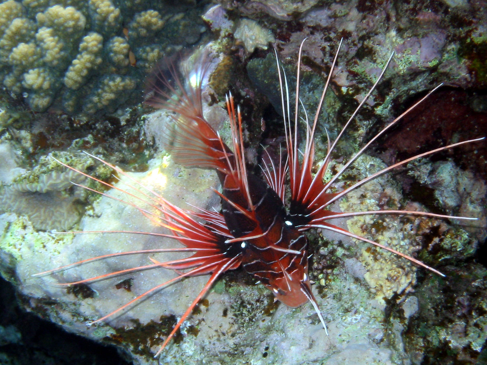 pterois radiata red sea dahab